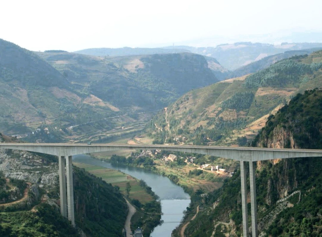 Chiny 2009 Yunnan - weekend